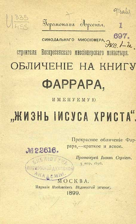 Арсений, иеромонах. Обличение на книгу Фаррара, именуемую „Жизнь Иисуса Христа“